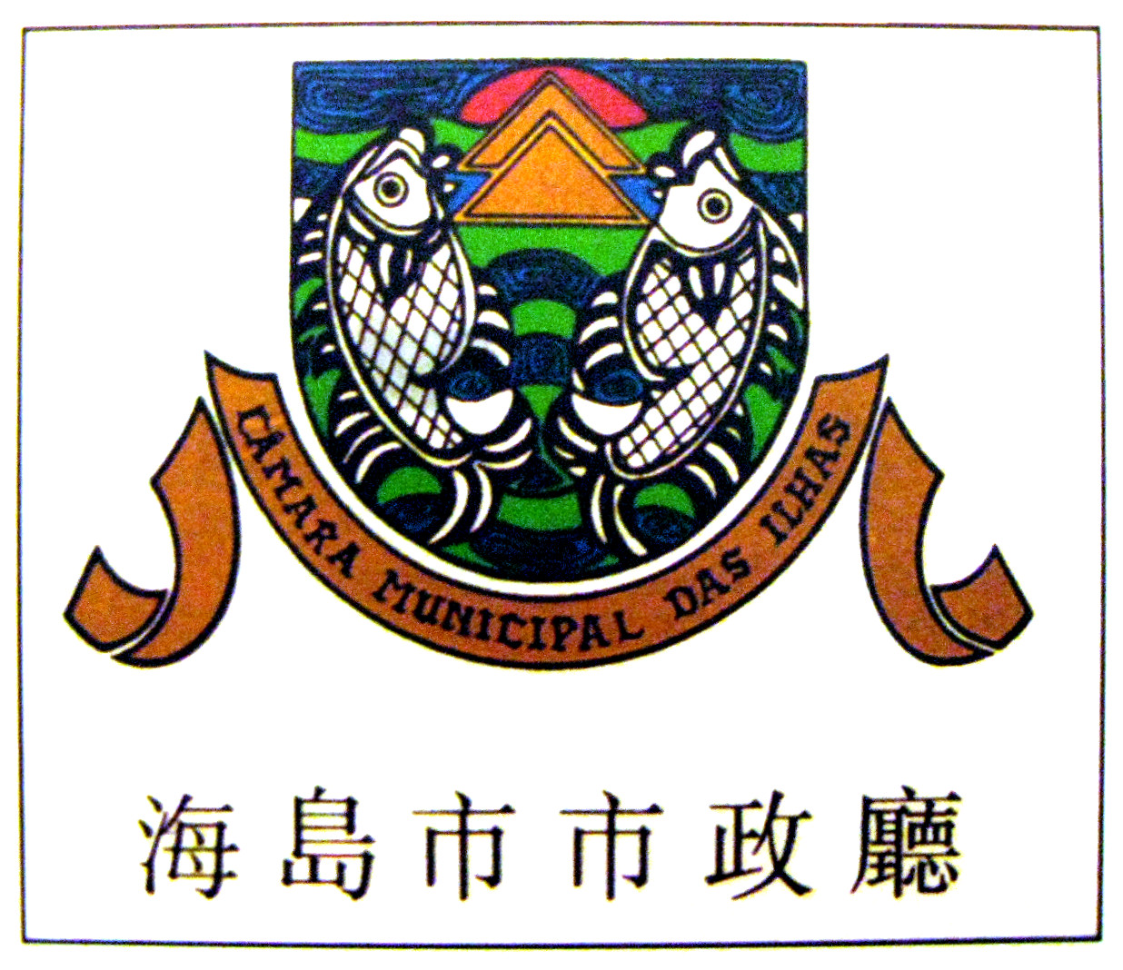 海島市市政廳徽號